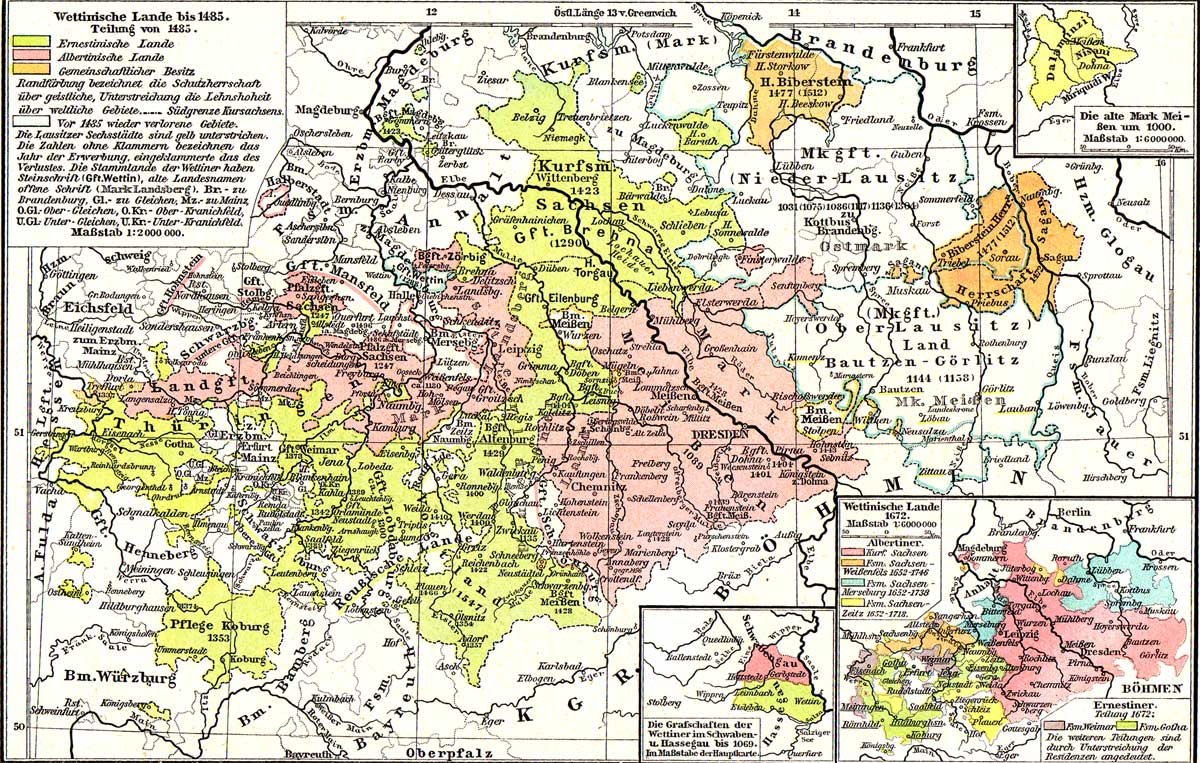 Karte Sachsens nach der Leipziger Teilung